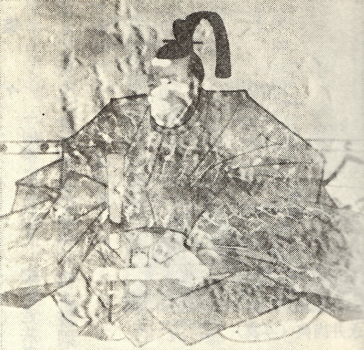 永井尚佐の肖像。